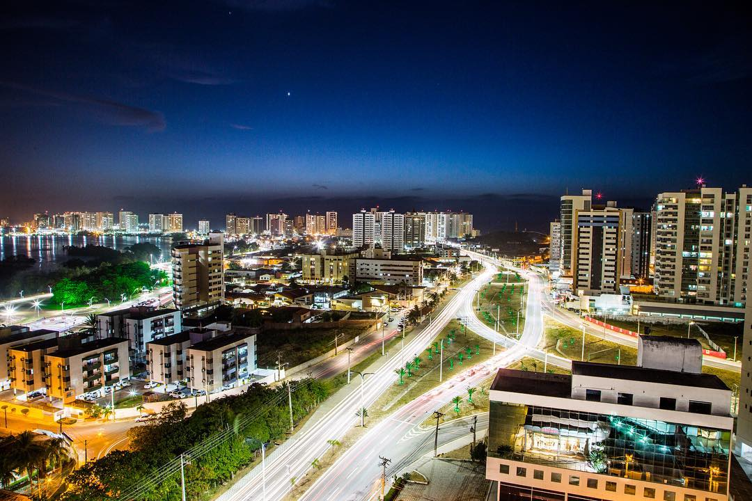 Imagem noturna da Ponta do Farol.